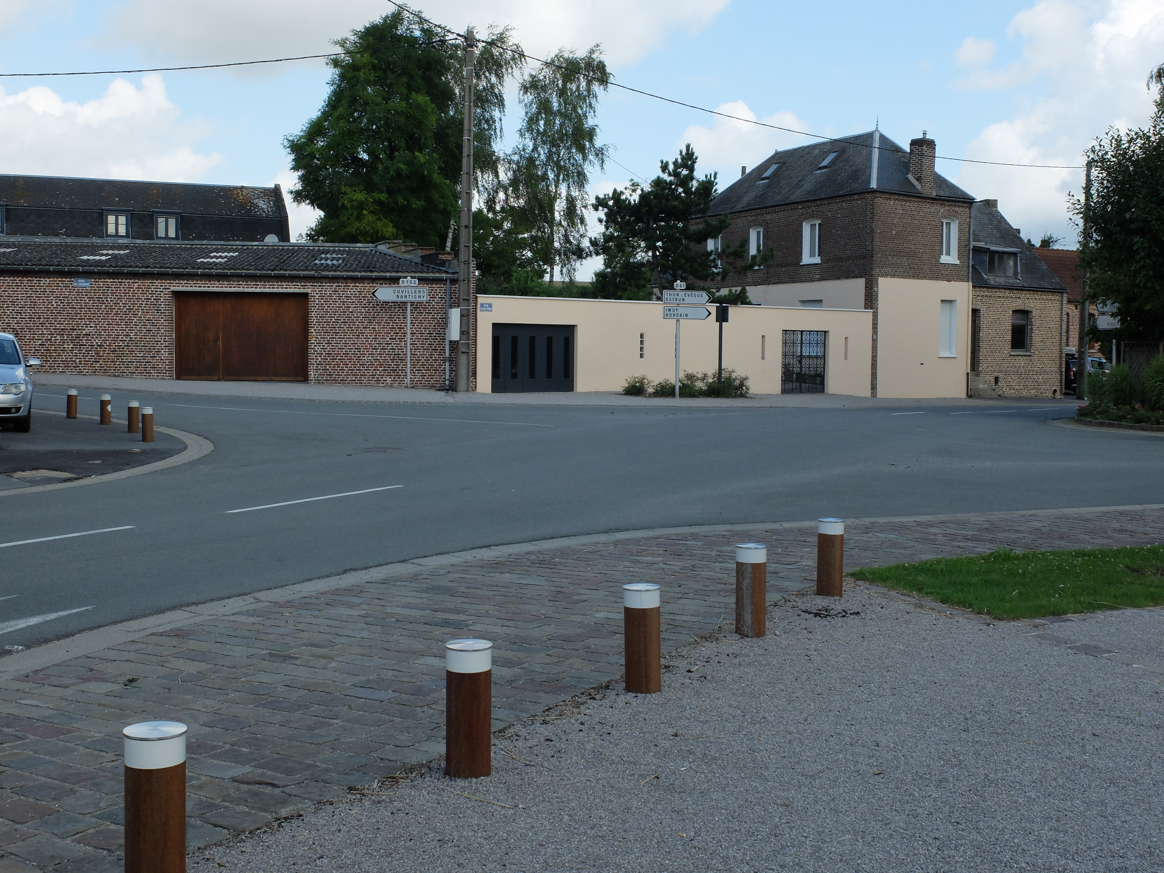 Carrefour visible depuis la mairie d'Eswars.